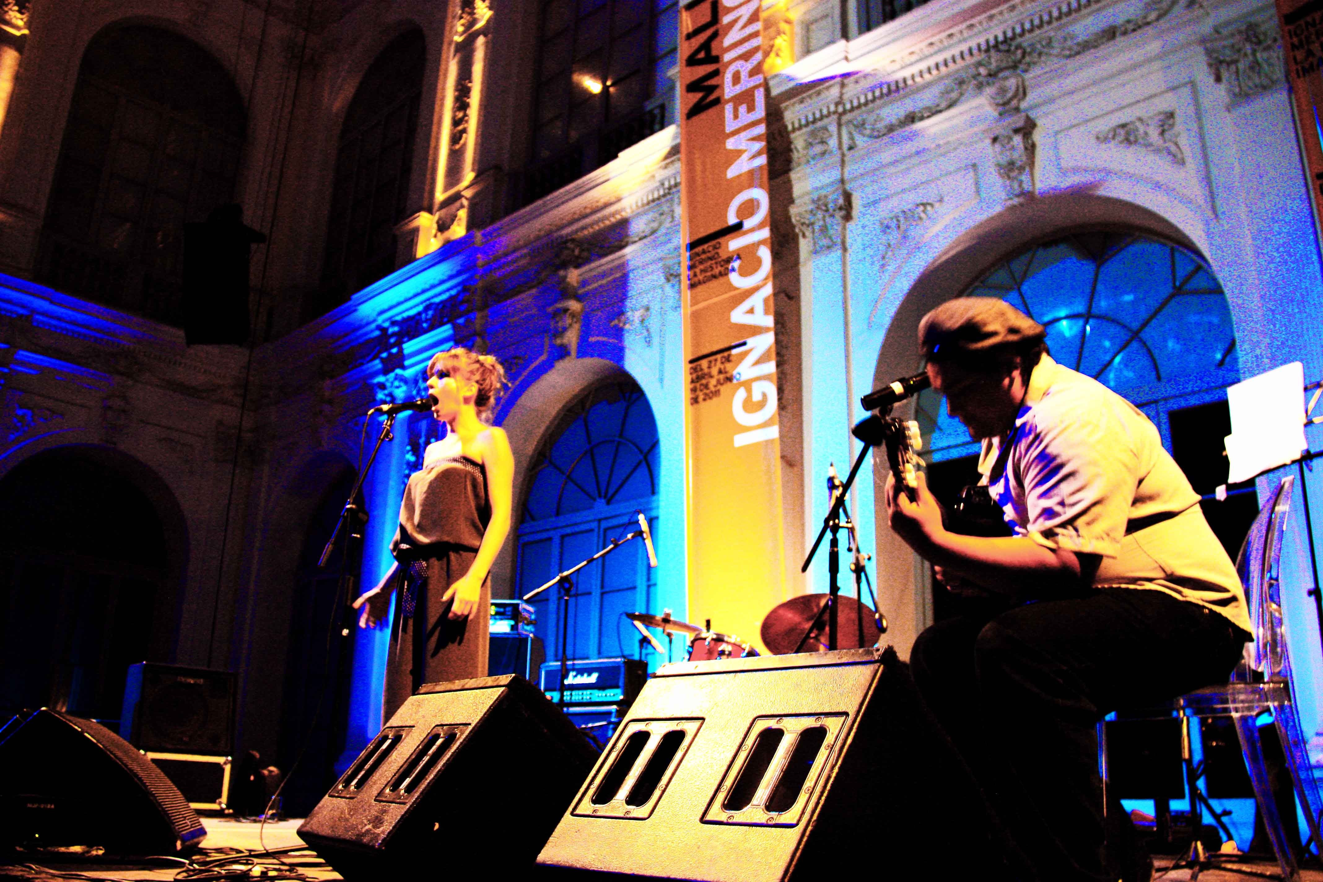 Pamela Rodríguez en el Museo de Arte de Lima